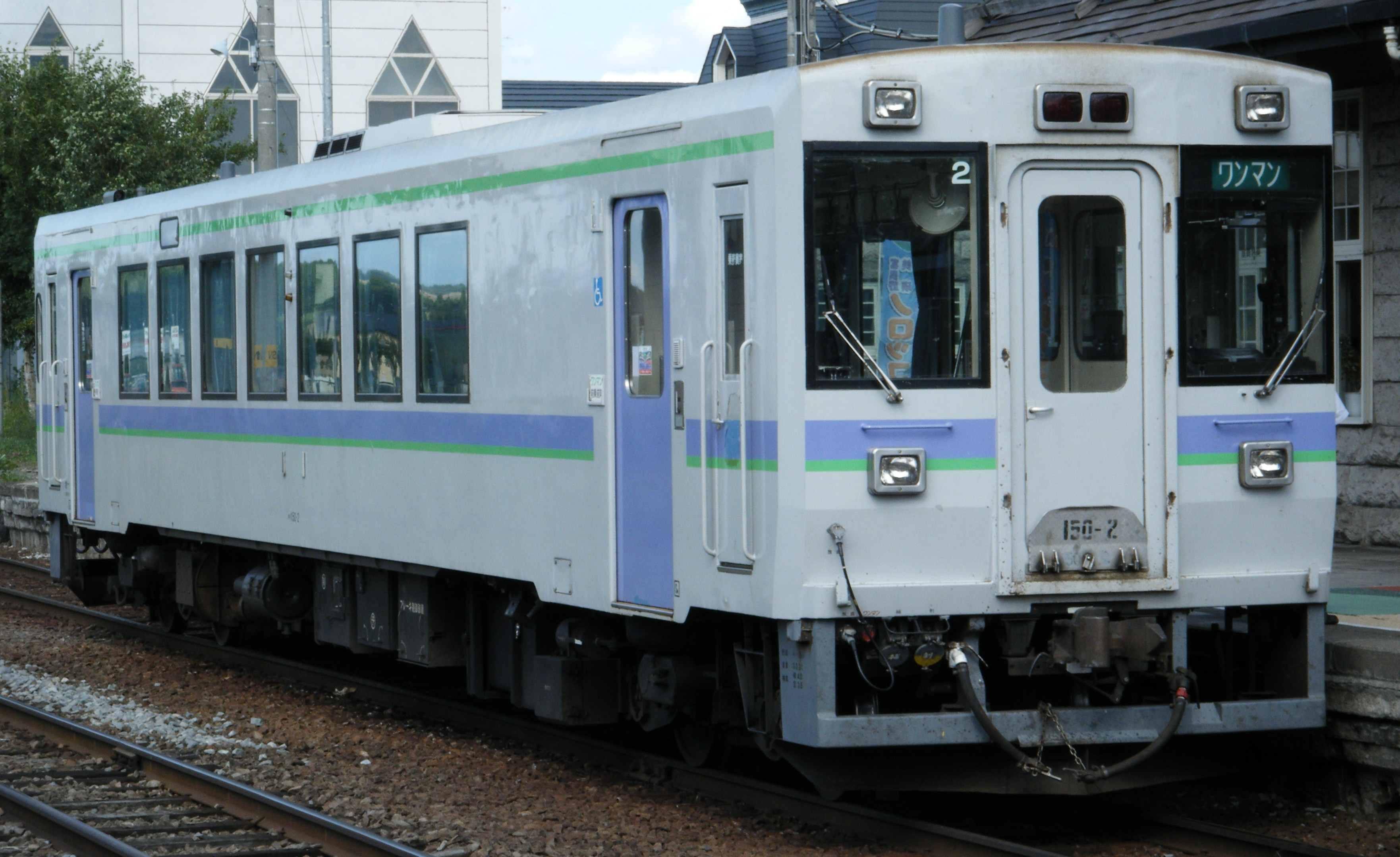 JR北海道キハ150形気動車（富良野線 美瑛駅にて撮影）